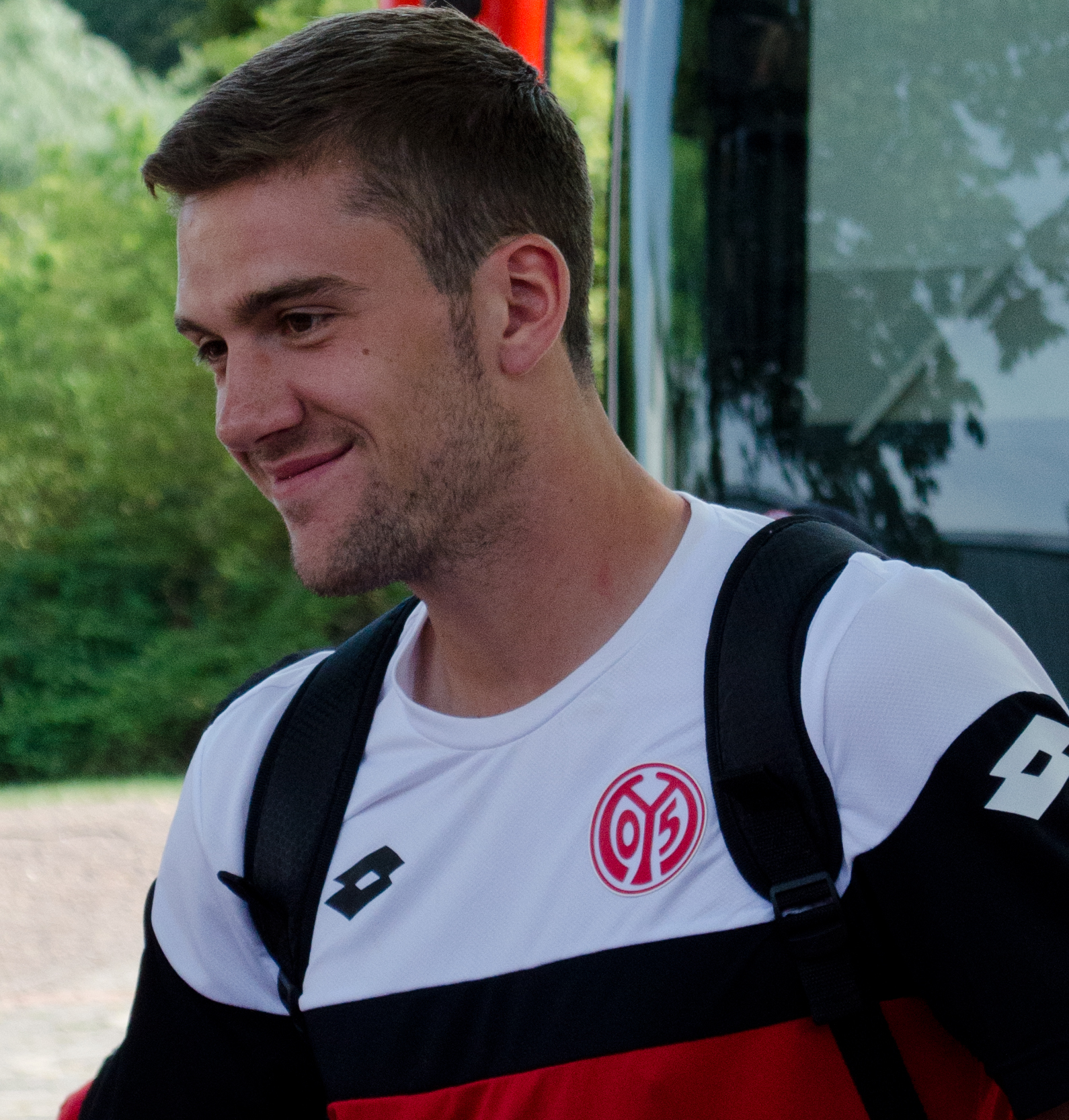 Stefan Bell, deutscher Fußballspieler